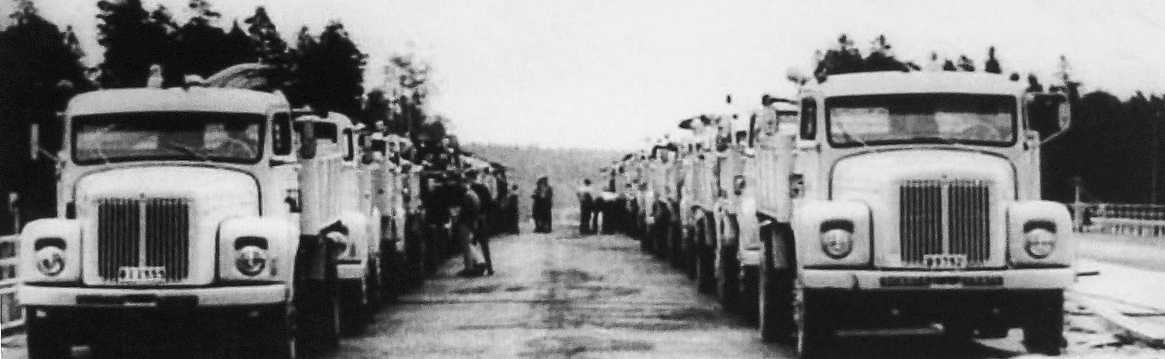 Hållfasthetsprov på Stäketbron. 32 lastbilar lastade med 15 ton makadam belastade bron.